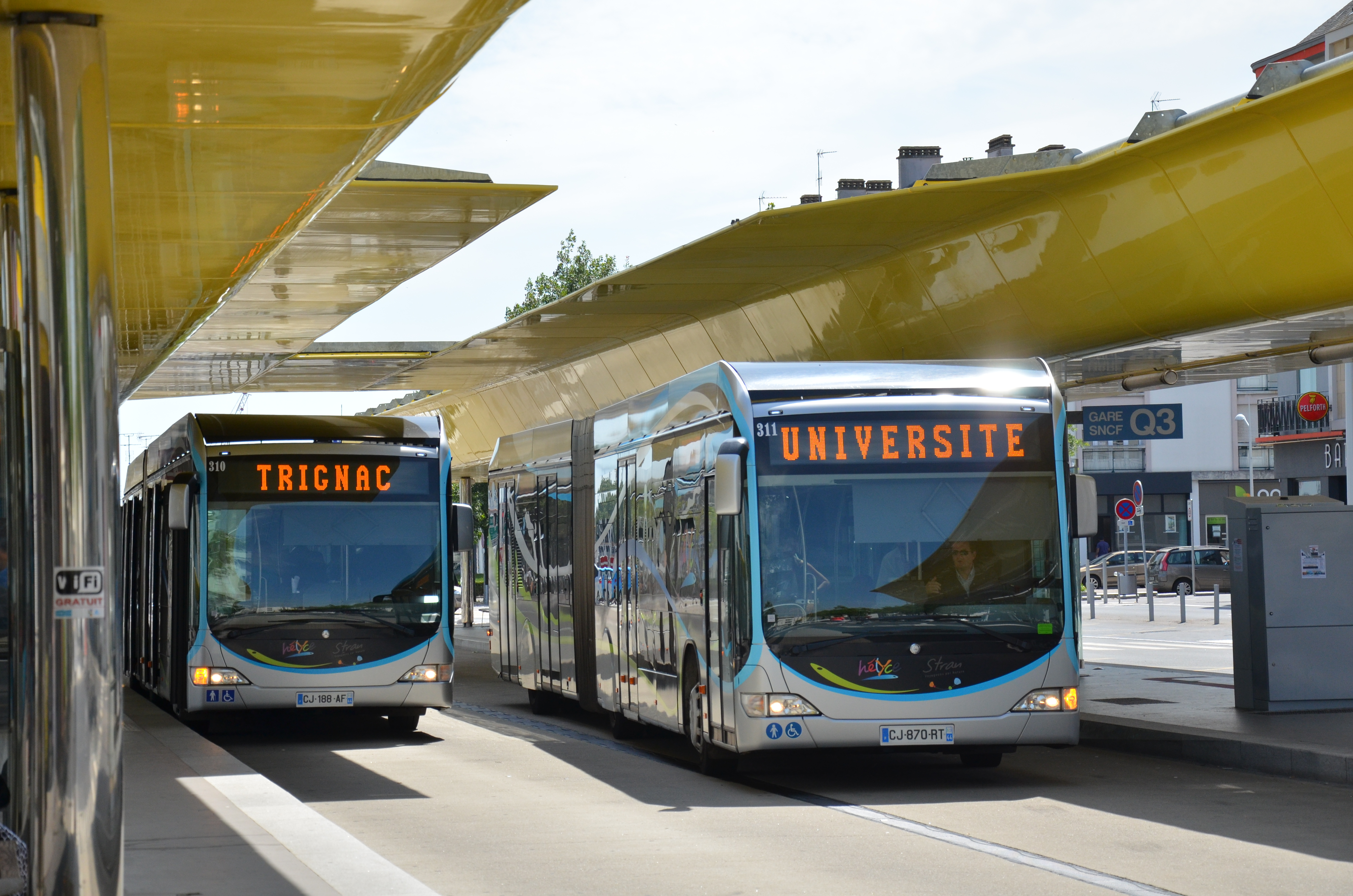 Mercedes Citaro G C1 FaceLift n°310 et 311 à la gare SNCF de Saint-Nazaire, sur la ligne HÉLYCE STRAN.